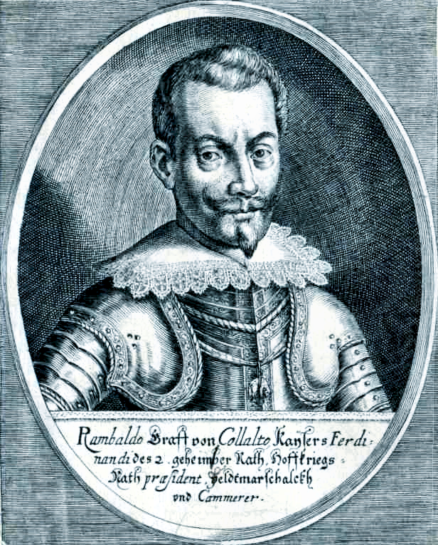 Reichsgraf Rambold XIII. von Collalto 1625, Hofkriegsratpräsident und Feldmarschall